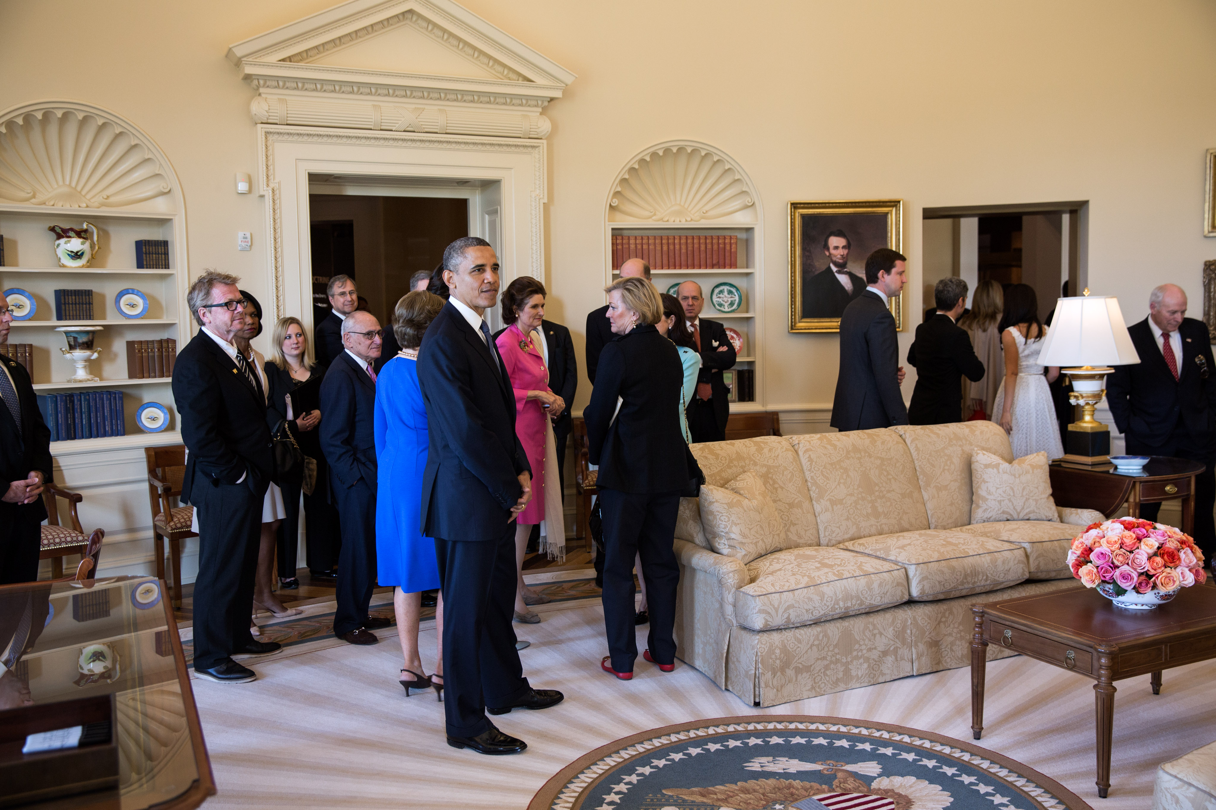 Barack Obame dans une réplique du bureau ovale au George W. Bush Presidential Center au Texas